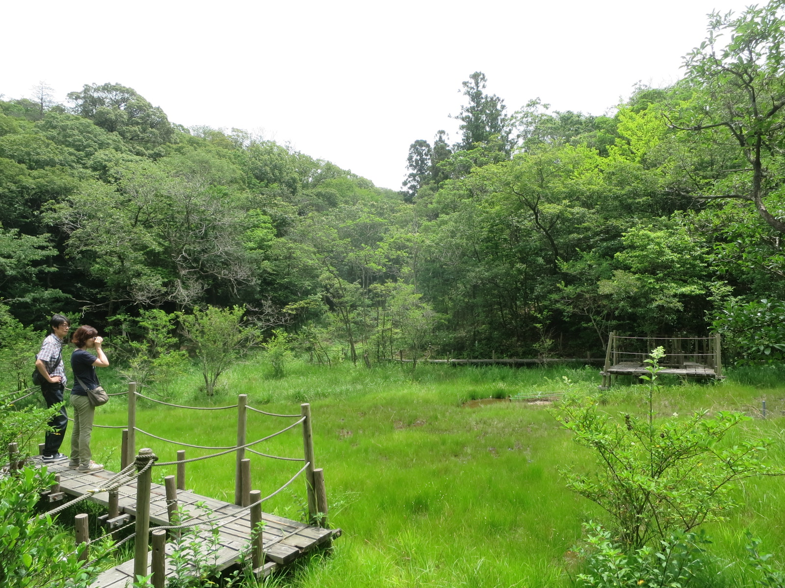 北山湿地（岡崎市池金町）